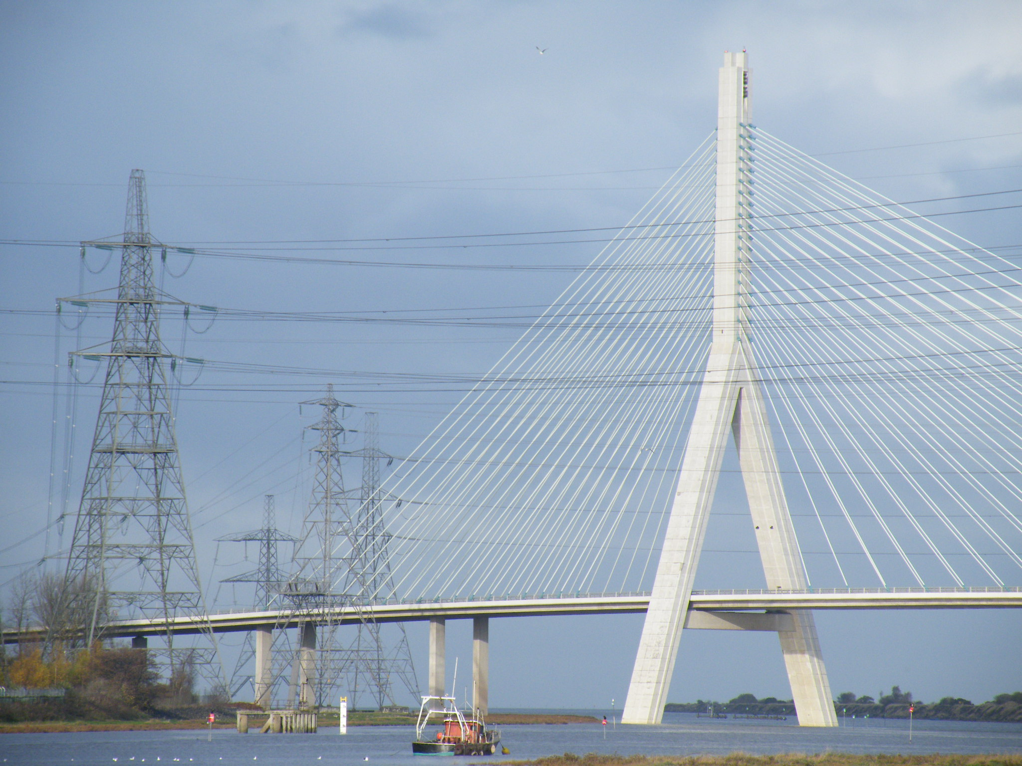 y bont a pheilonau